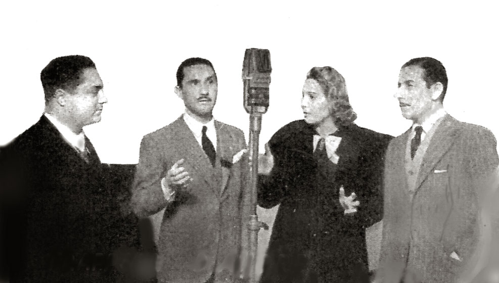 Il regista Matarazzo con Paolo Stoppa, Loretta Vinci e Giuseppe Porelli, al doppiaggio di "Trappola d'amore" (1940)